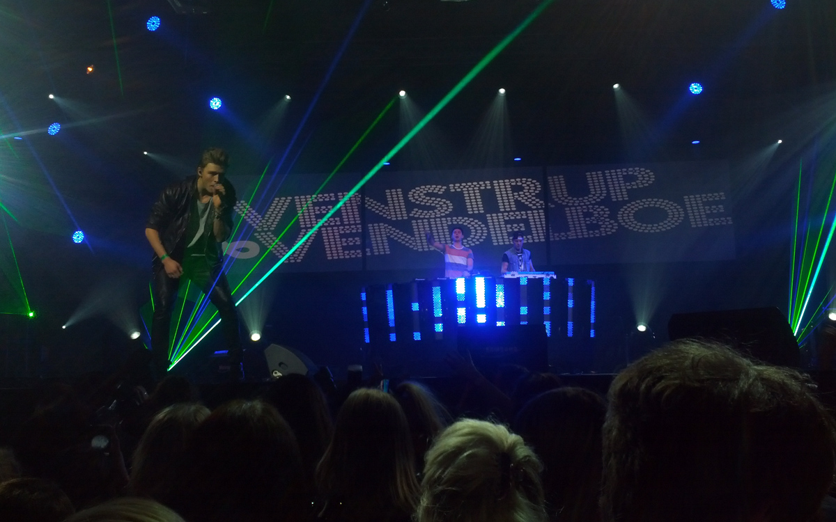 Billede jeg tog, da Svenstrup & Vendelboe optrådte sammen med Christopher under Danish DeeJay Awards 2013.